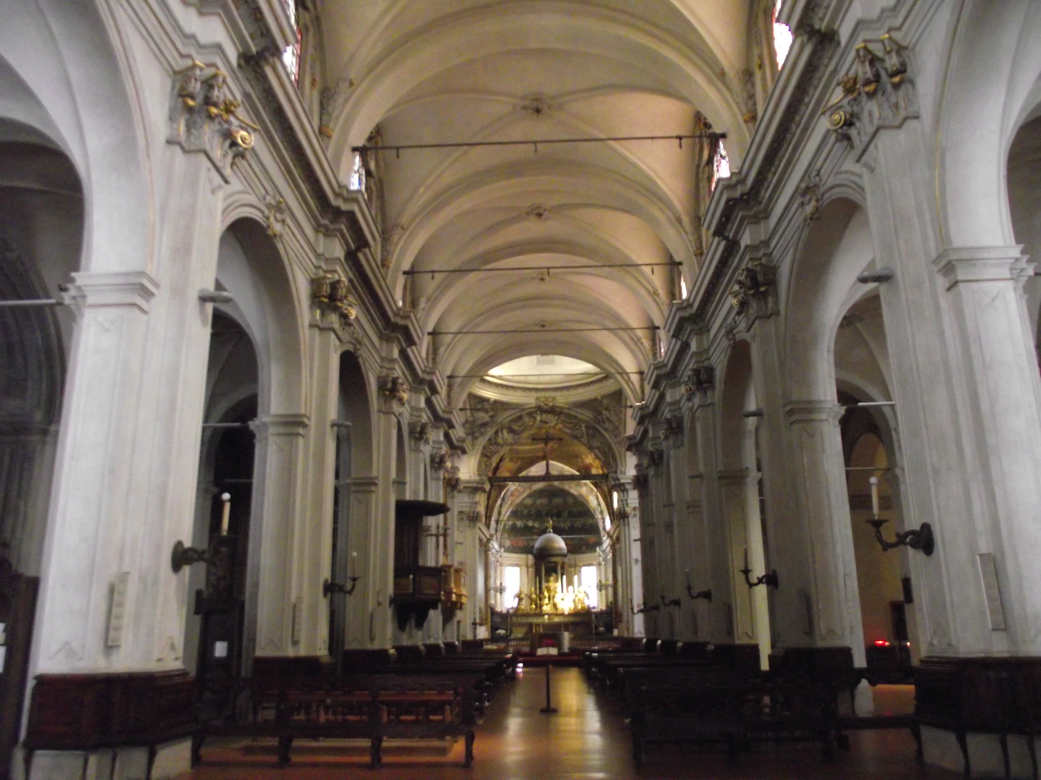 Interno